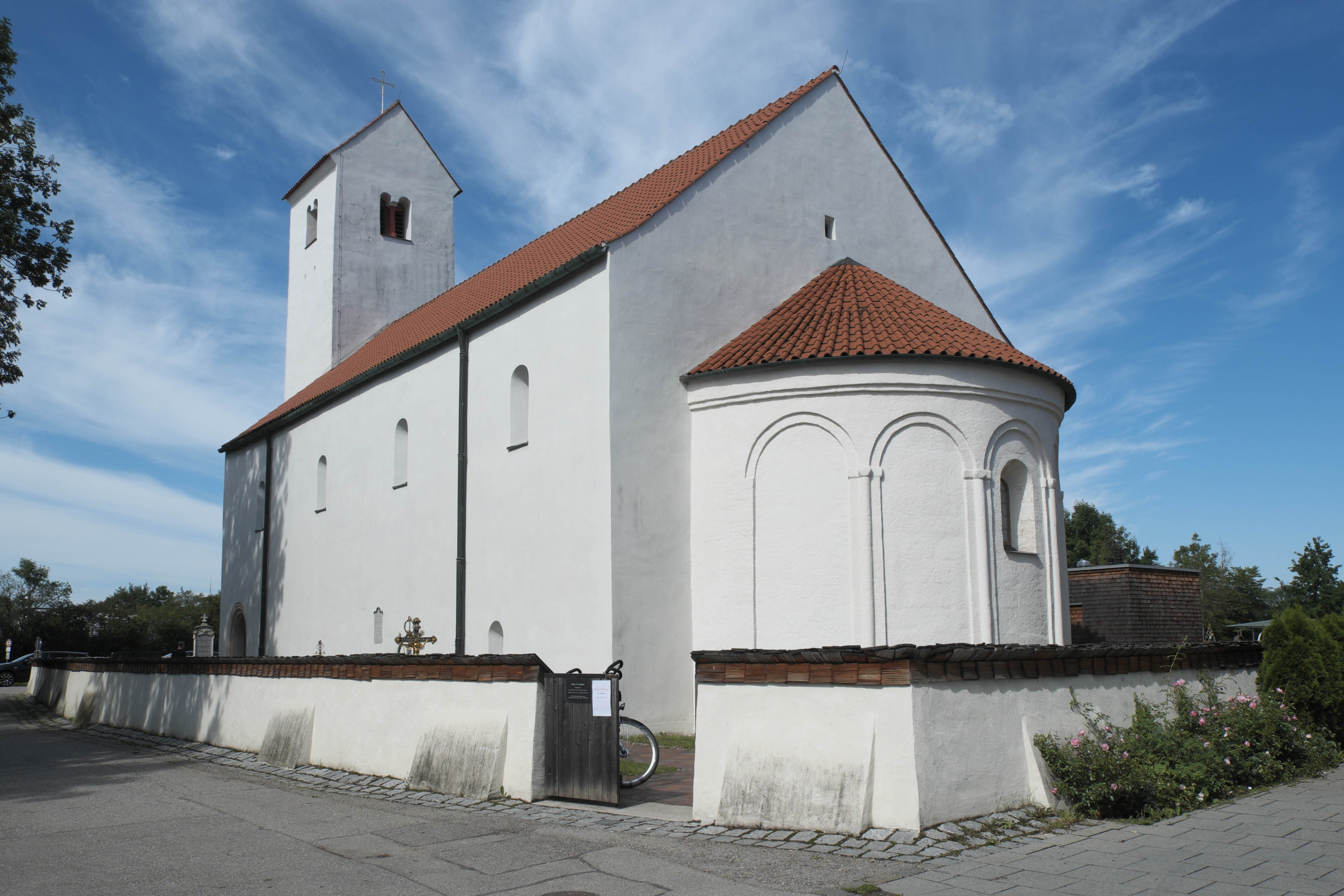 Katholische Filialkirche St. Aegidius in Keferloh (Grasbrunn) im Landkreis München (Bayern/Deutschland)